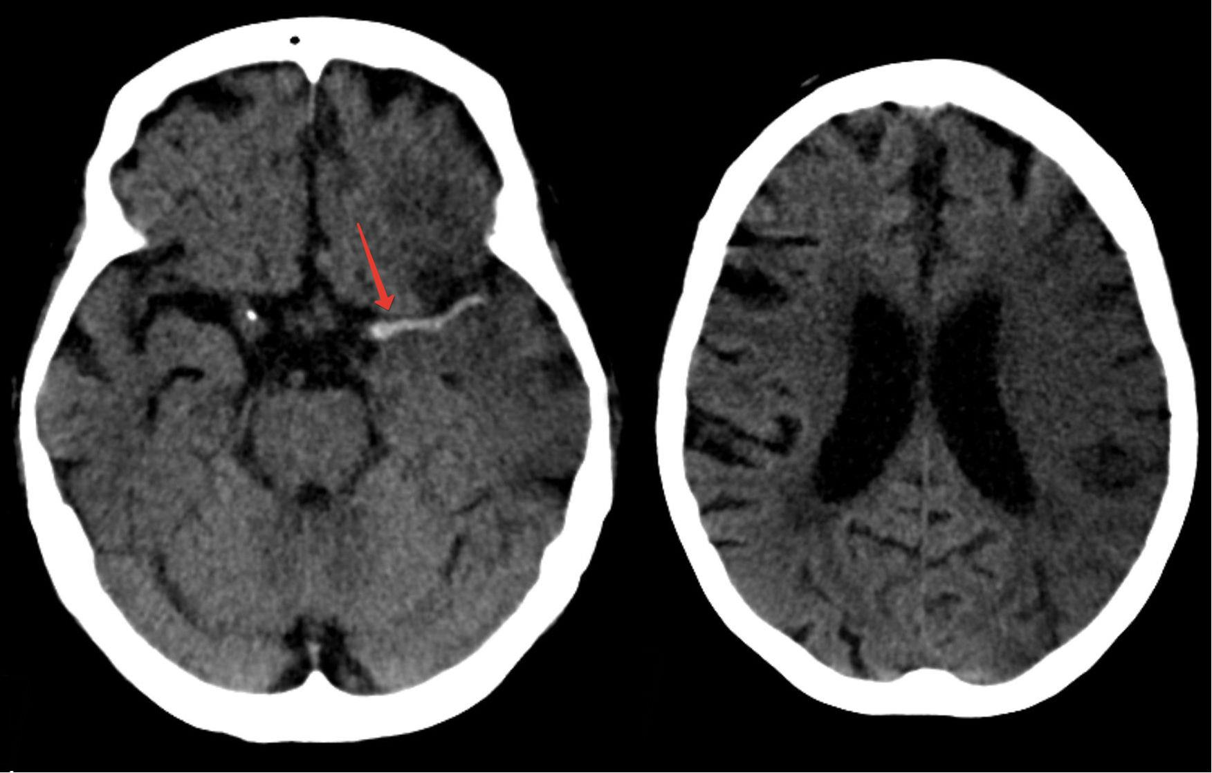 Frischer Infarkt im Stromgebiet der Arteria cerebri media mit sehr deutlichem "dense media sign" (allgemeiner "dense artery sign") oder deutsch "Dichte-Media-Zeichen", linkes Bild. Rechts der sich nach ca. 7 Stunden schon deutlich demarkierende Infarkt.